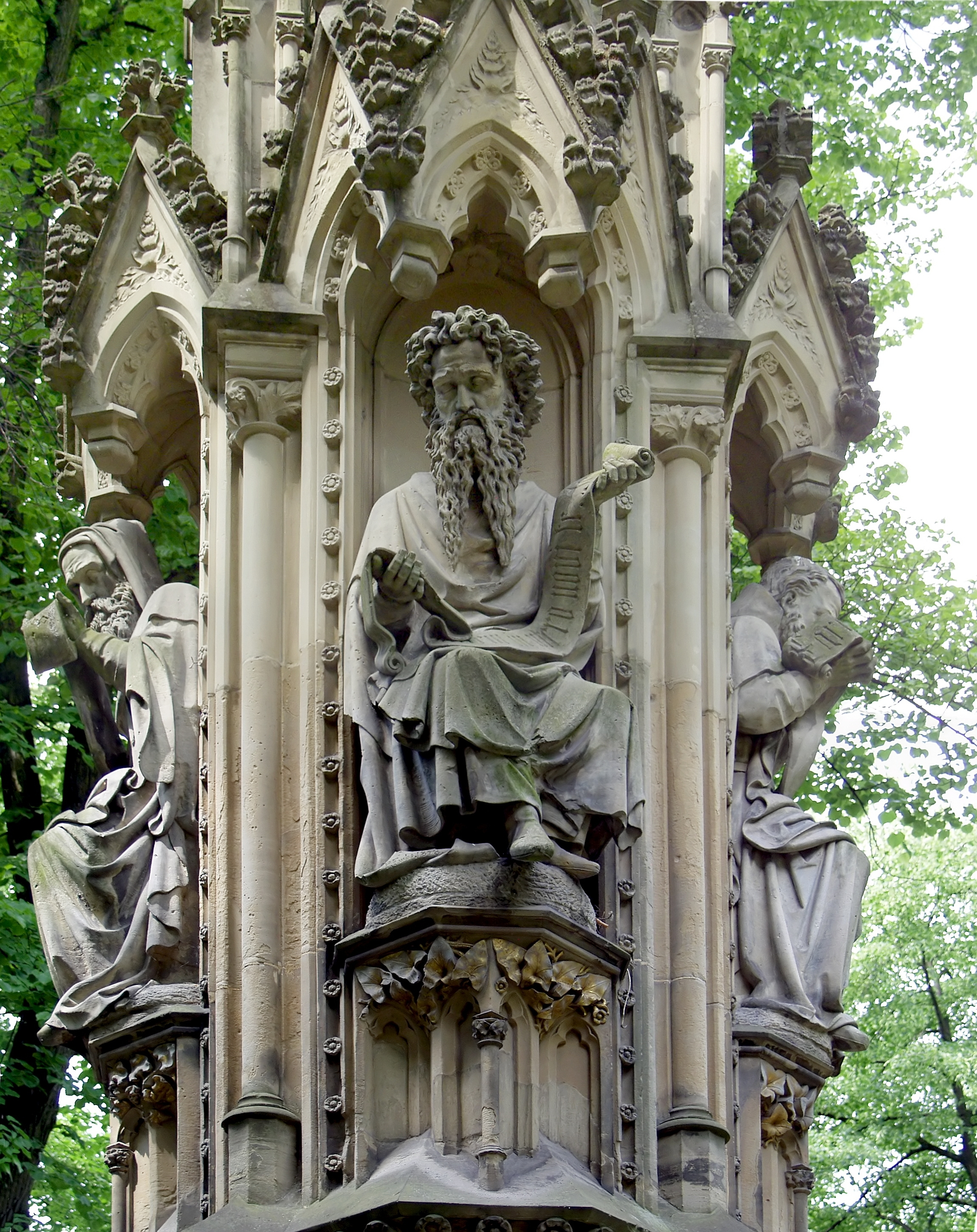 Detail von der Mariensäule (Köln): Prophet Jeremia. Entwurf: Edward von Steinle, Ausführung: Peter Fuchs.